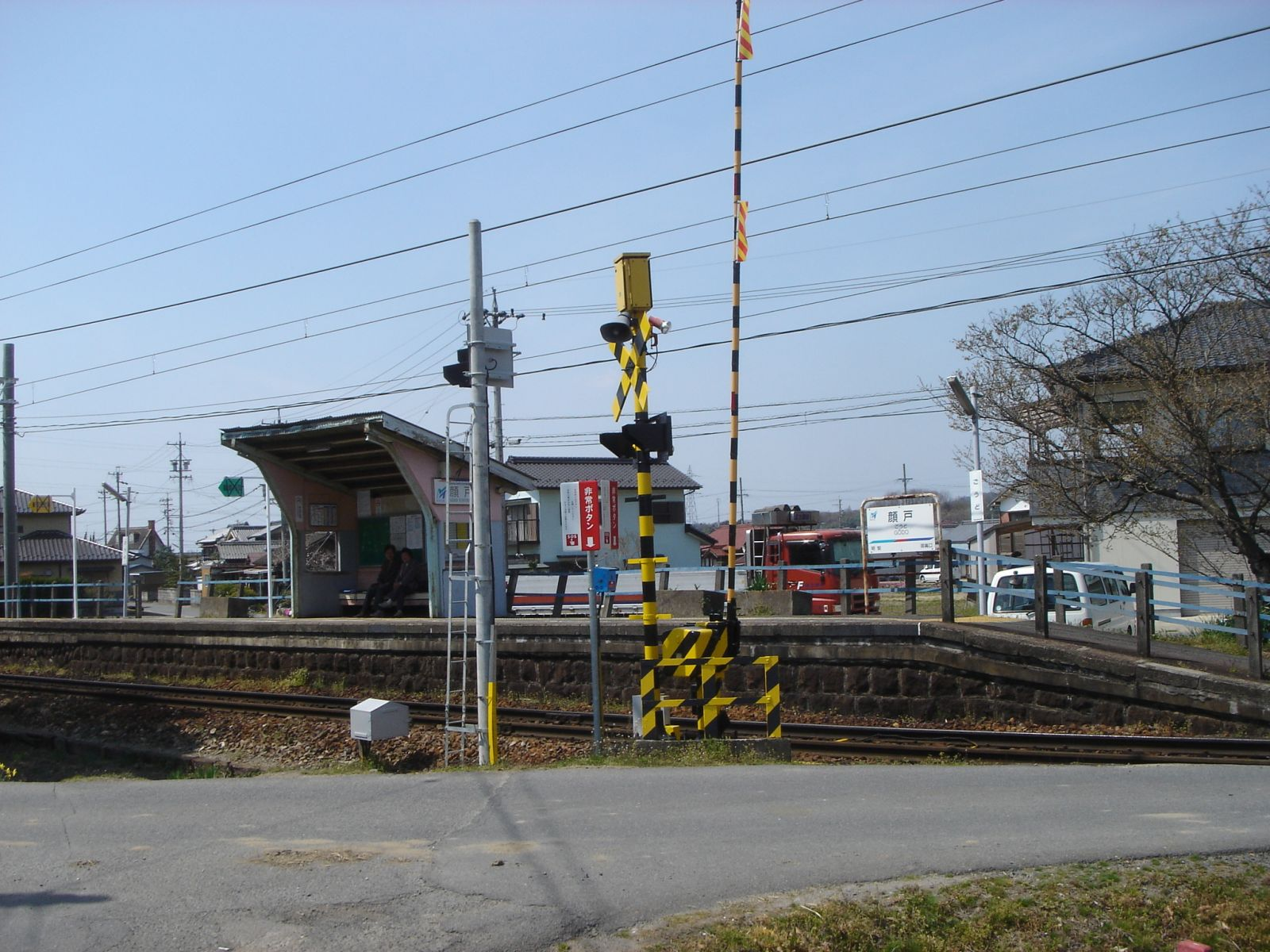 Godo Station (名鉄広見線、顔戸駅）,Mitake,Gifu,Japan(岐阜県御嵩町)で撮影。